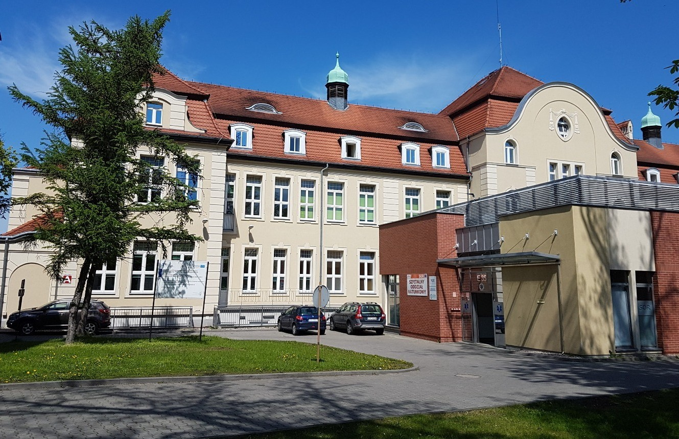 Stargard, 2017r. Szpital Powiatowy